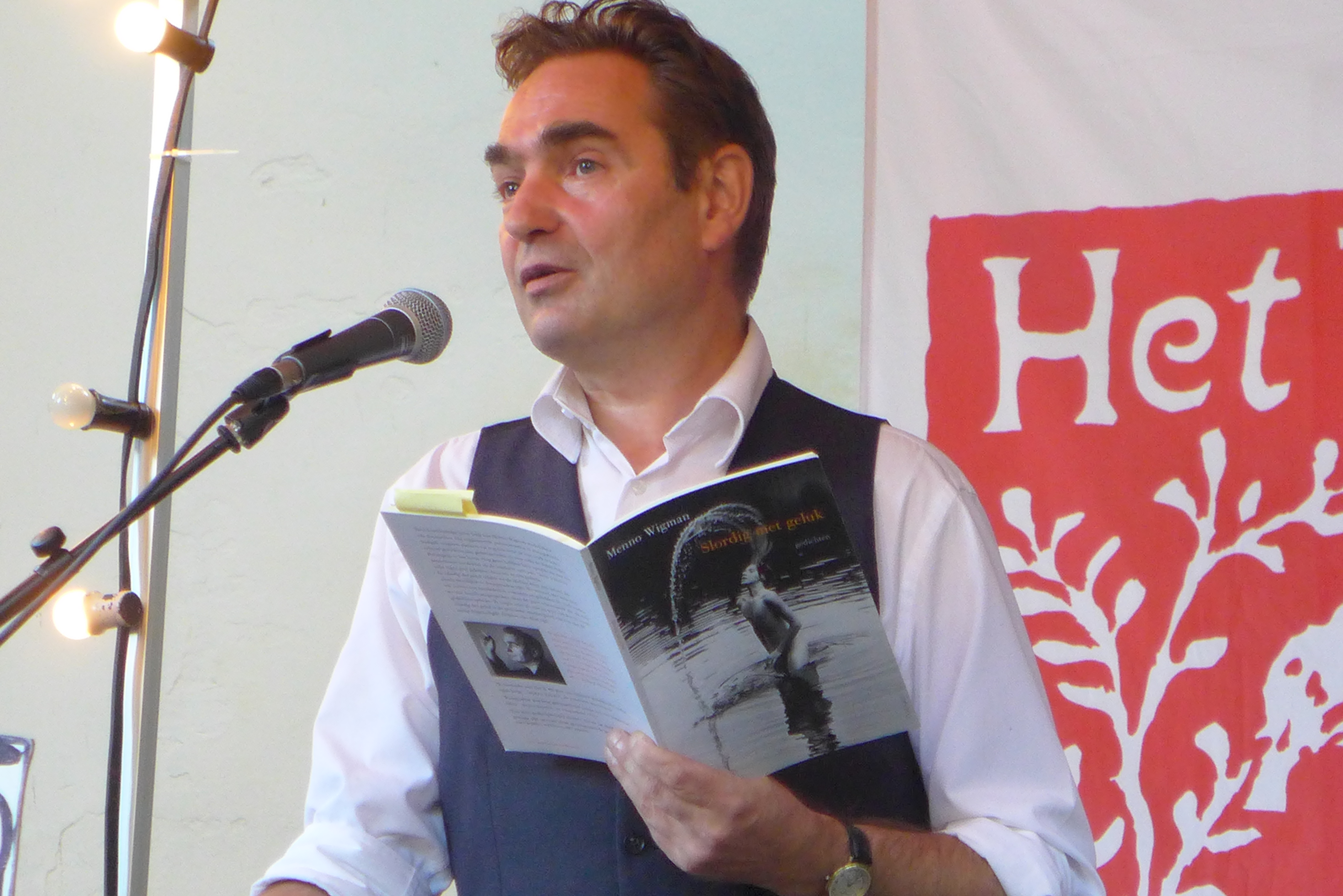 Menno Wigman op het poëziefestival Het Tuinfeest in Deventer, 6 augustus 2016